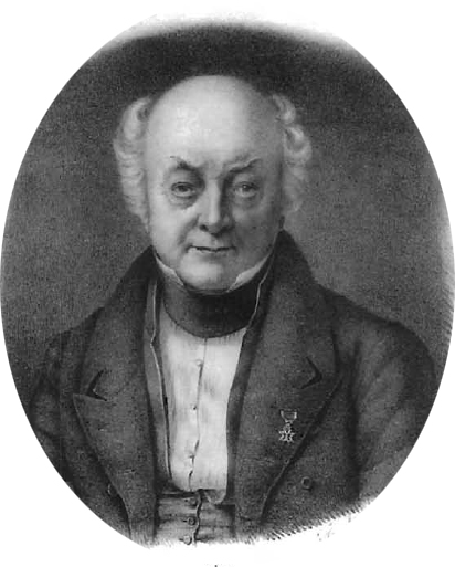 Portret van Claudius Pieter Gevers (1770-1836)